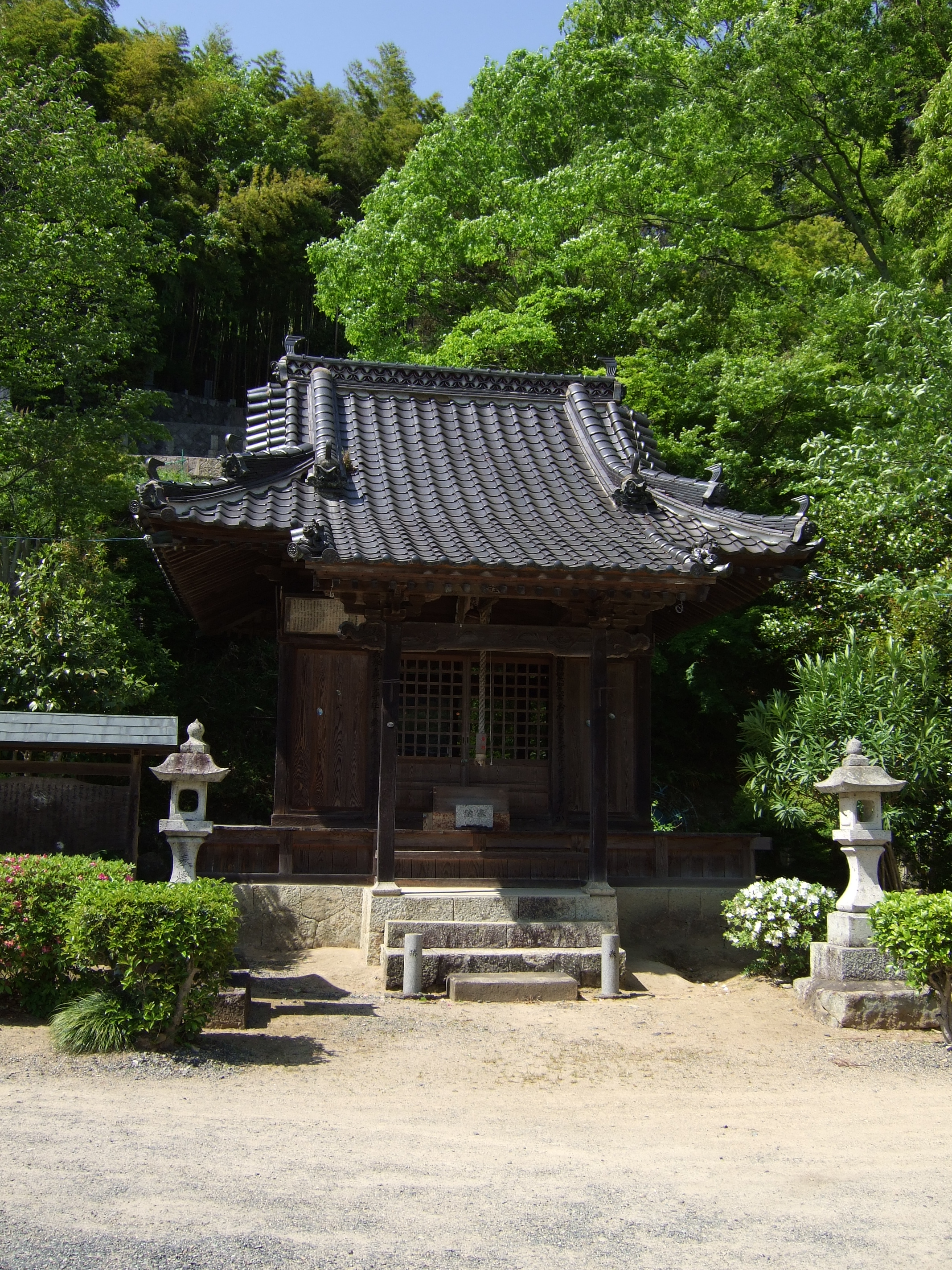 湯郷